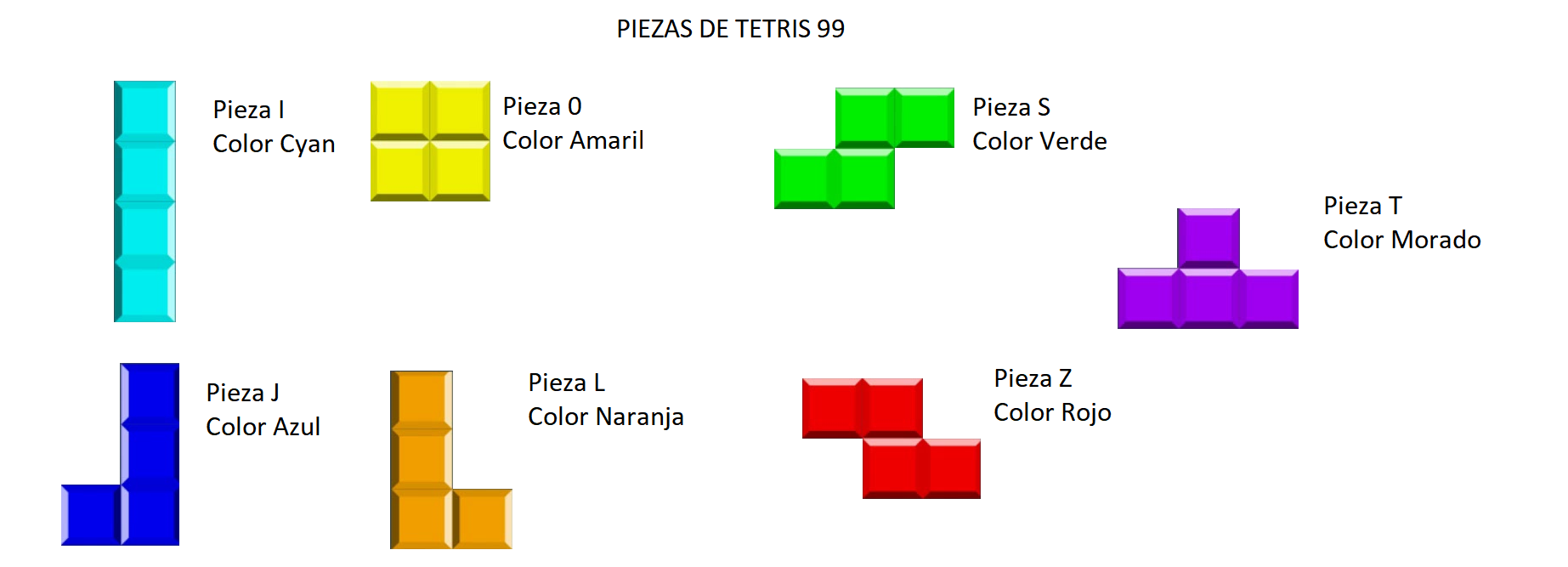 Lista de piezas de Tetris 99